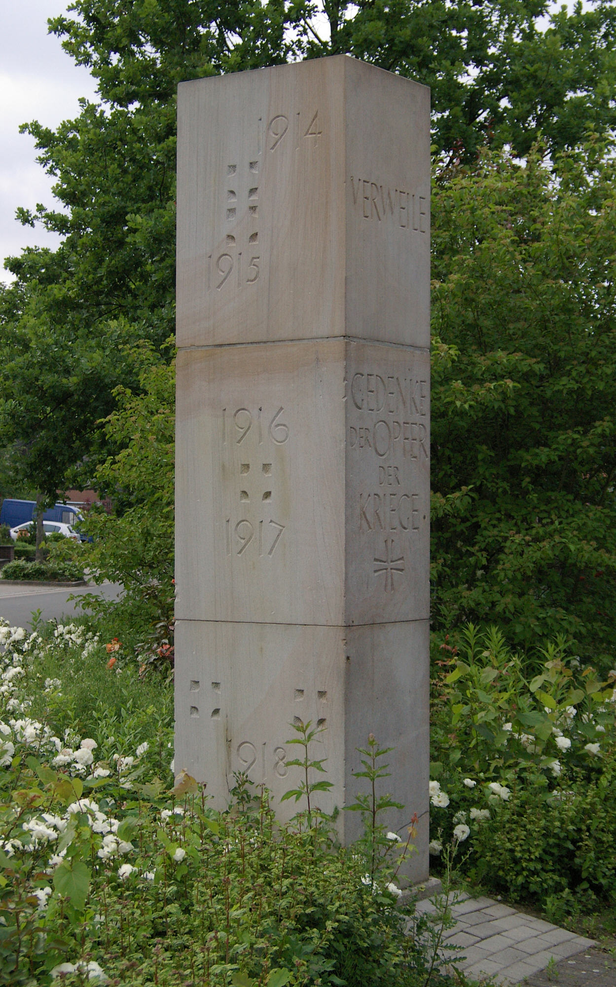 Mahnmal in Unna-Uelzen, Nordrhein-Westfalen